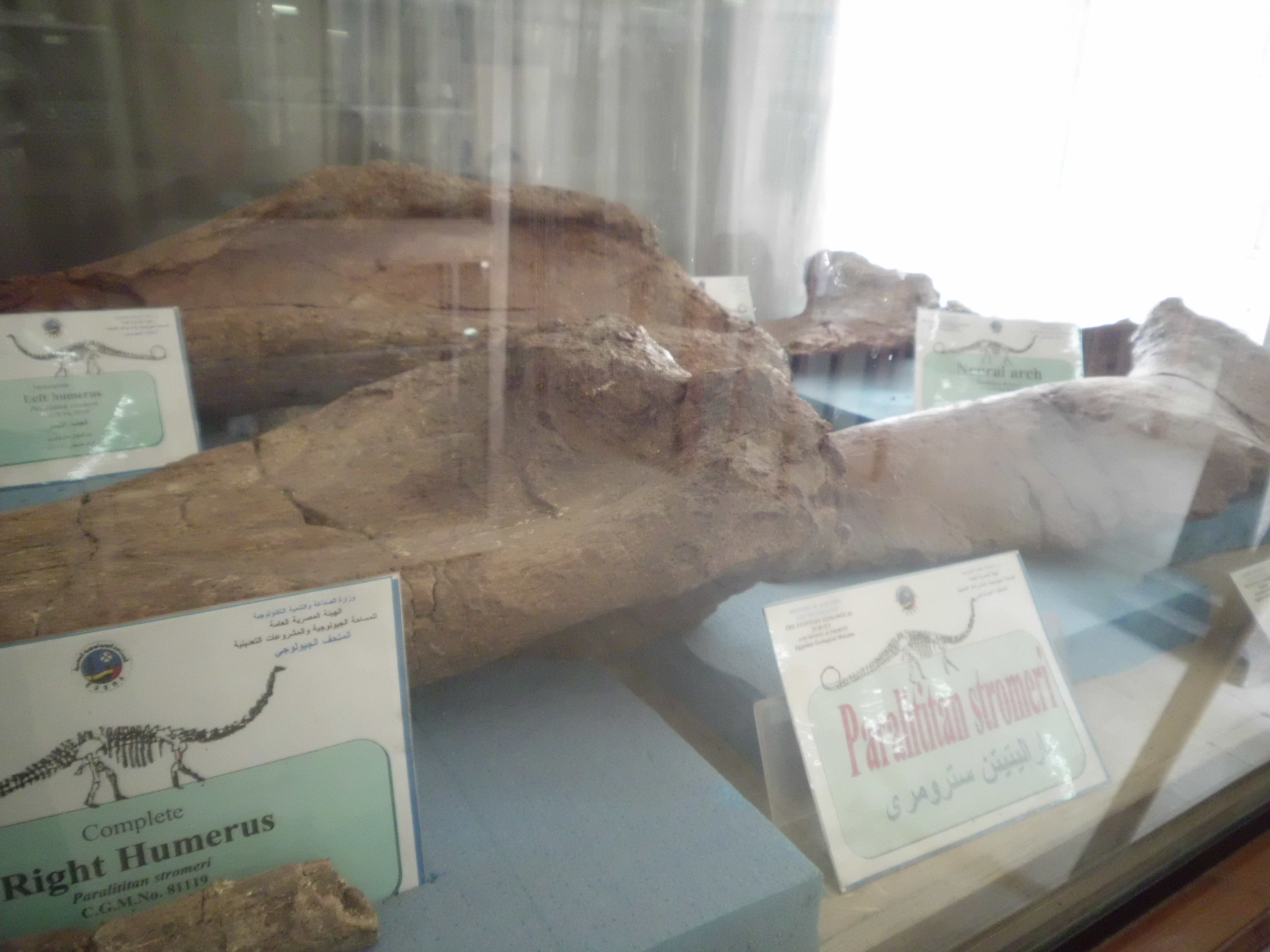 هو احد انواع الديناصورات اكلة الاعشاب في العصر الطباشيري المتاخر بمنطقة الواحات البحرية منذ ما يقرب من 95 مليون سنة وتم اكتشافه بواسطة المساحة الجيولوجية المصرية عام 2000 وكلمة الباراليتيتن كلمة لاتينة تعني (ديناصور المد والجزر) وهو ديناصور اكل للاعشاب يمتاز بحجم جمجمة صغير ورقبة طويلة واطراف امامية مساوية في الطول للاطراف الخلفية وذيل طويل وبلغ وزنه 80 طن وطوله 33,5 متر ويعد ثاني اضخم ديناصور في العالم في العصر الطباشيري وكان فريسه سهله لديناصور اسبينوسورس والكركرودونت سورس والبحرية سورس